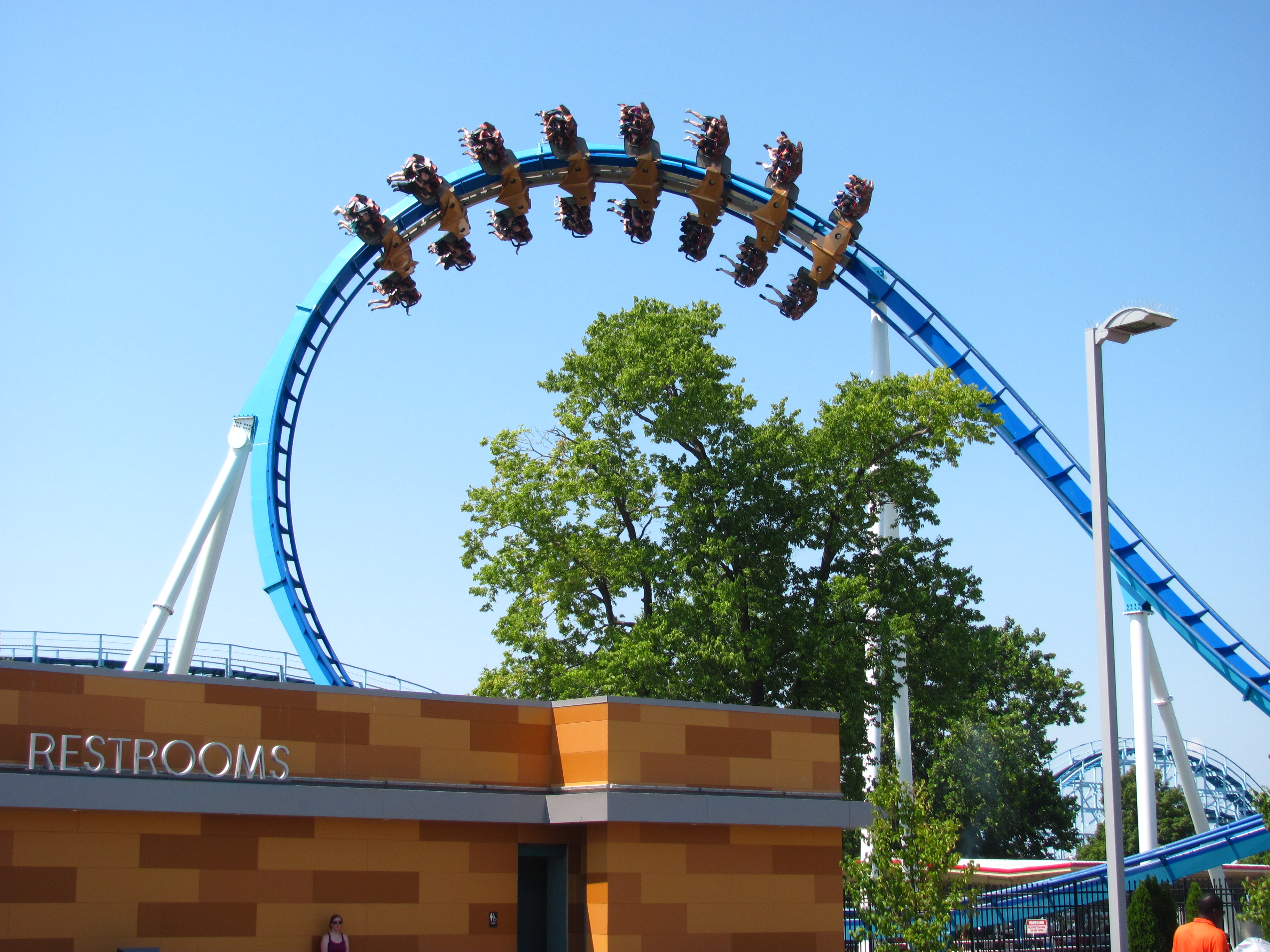 Cedar Point 017